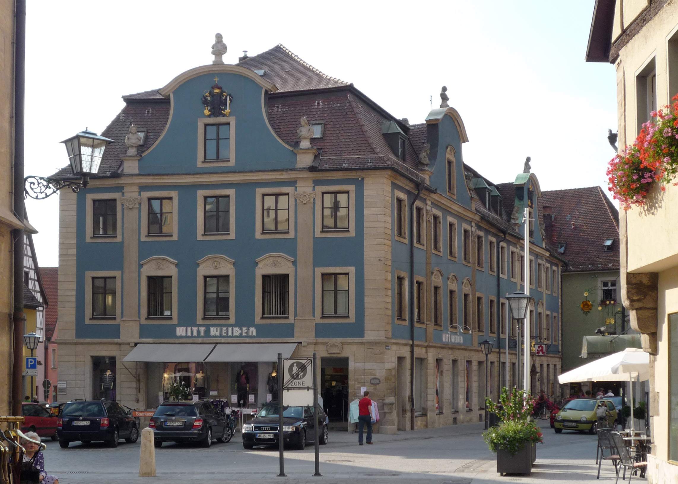 "Blauen Hauses" (Spätbarock-Bau aus dem Jahre 1760 bis 1767) mit Apothekenmuseum im früheren Arzneikeller. - Rosenstraße